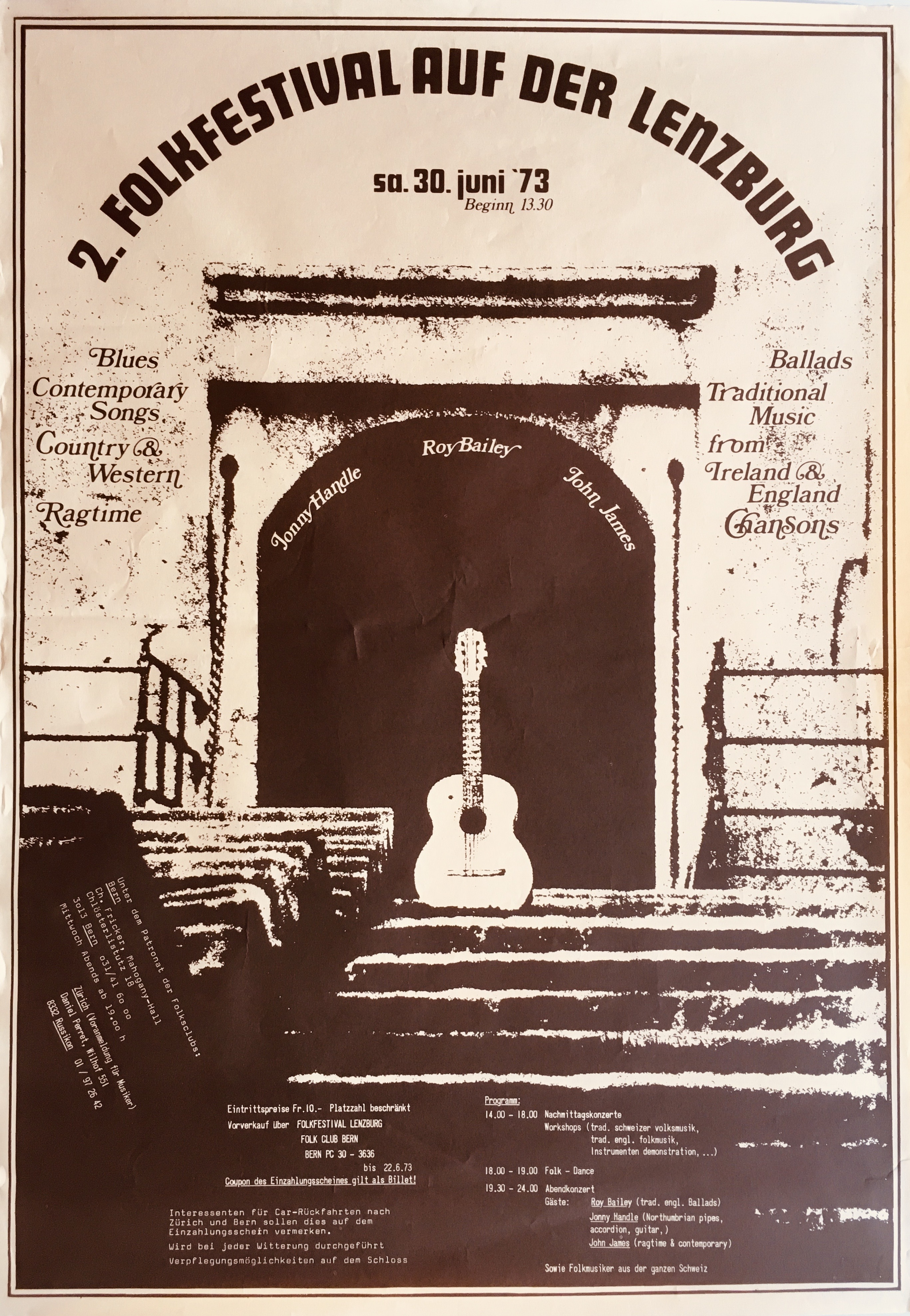 Originalplakat des 2. Folkfestivals auf der Lenzburg (CH) von 1973 mit Auflistung der wichtigsten Infos und Künstler.